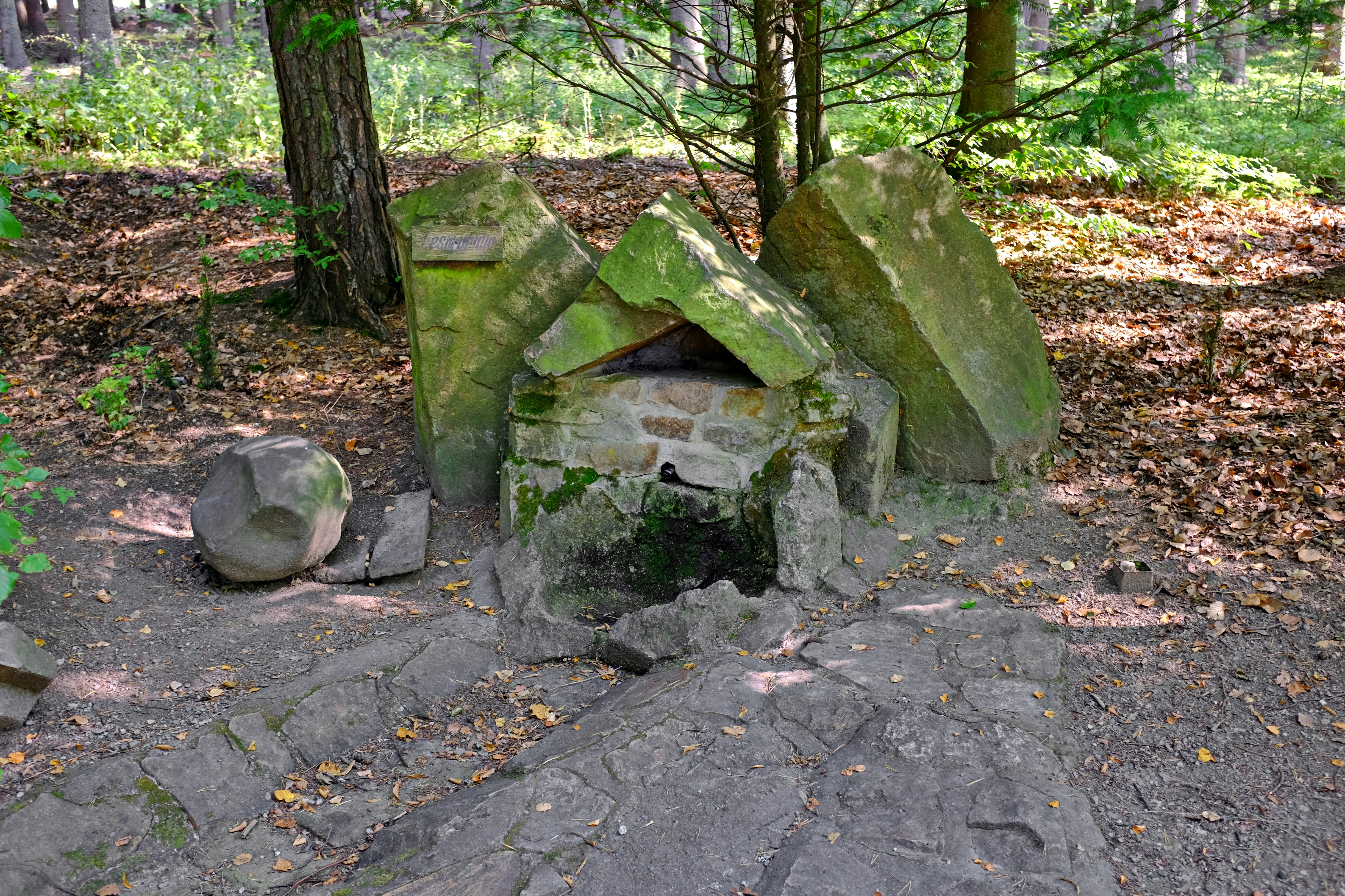 Karlovarské lázeňské lesy, pramen Lesní vřídlo